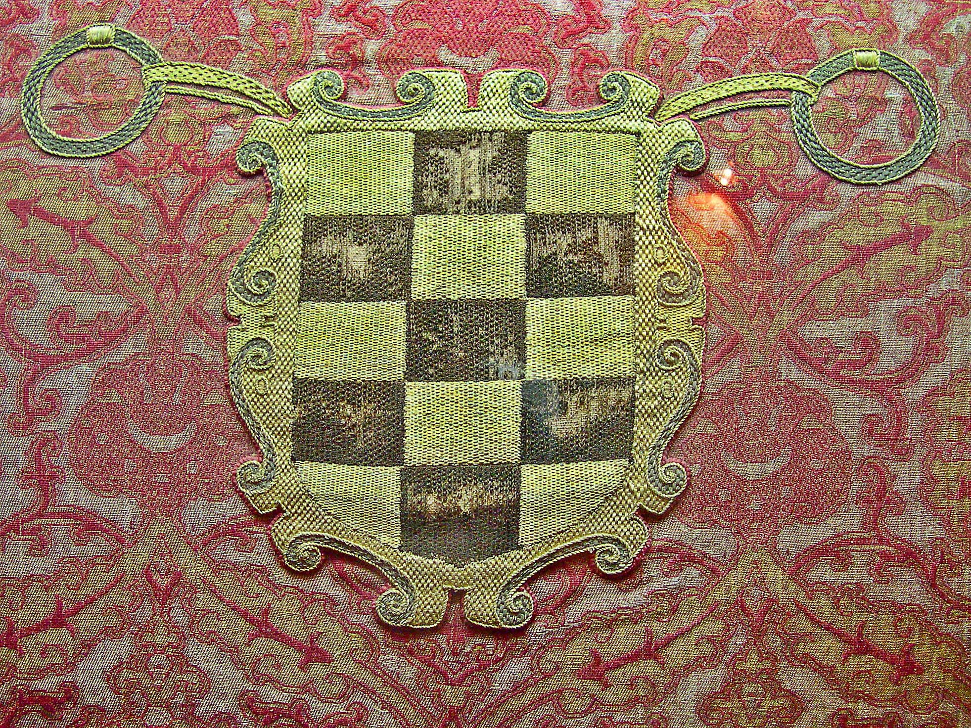 Estandarte del Conde Ansúrez, Museo Arqueológico de Valladolid